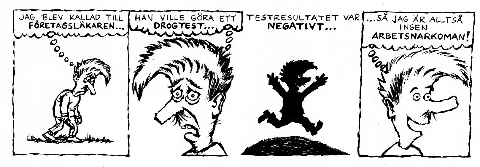 Allan seriefigur publicerad i LO-tidningen 2004, tecknad av Nisse Lindberg